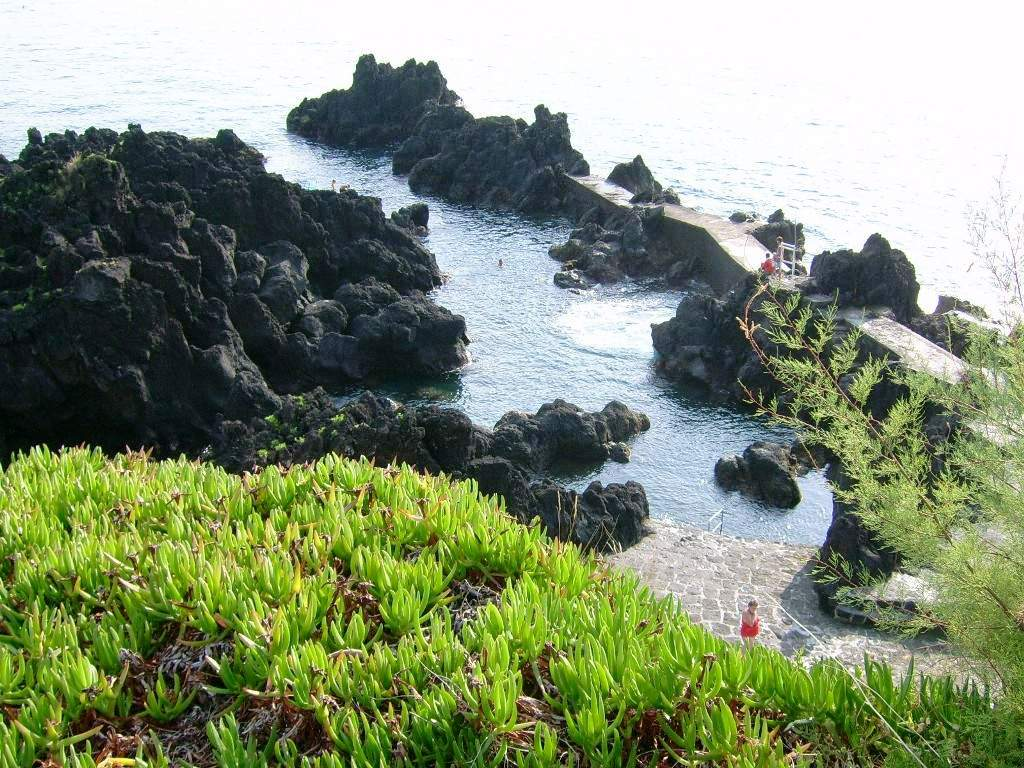 Vistar parcial da zona balnear da Fajã Grande, Calheta, ilha de São Jorge, Açores, Portugal